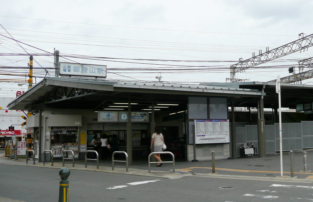 京阪電気鉄道ja:御殿山駅駅舎 投稿者↑PON（ウエポン）が2007年9月24日に撮影 一部編集の上で2007年9月29日 (土) 21:30 (UTC)にアップロード